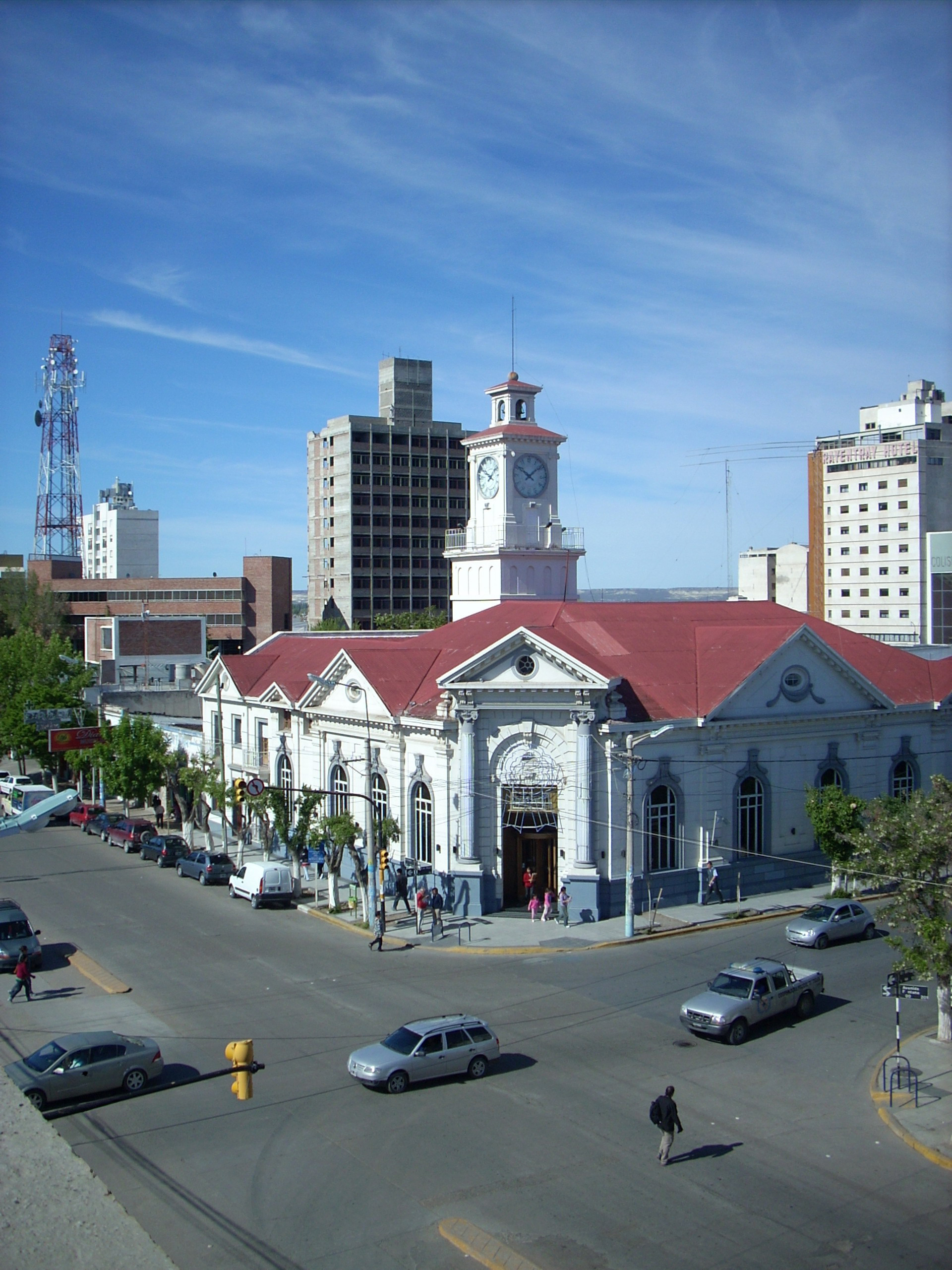 Vista del edificio del Banco Nación